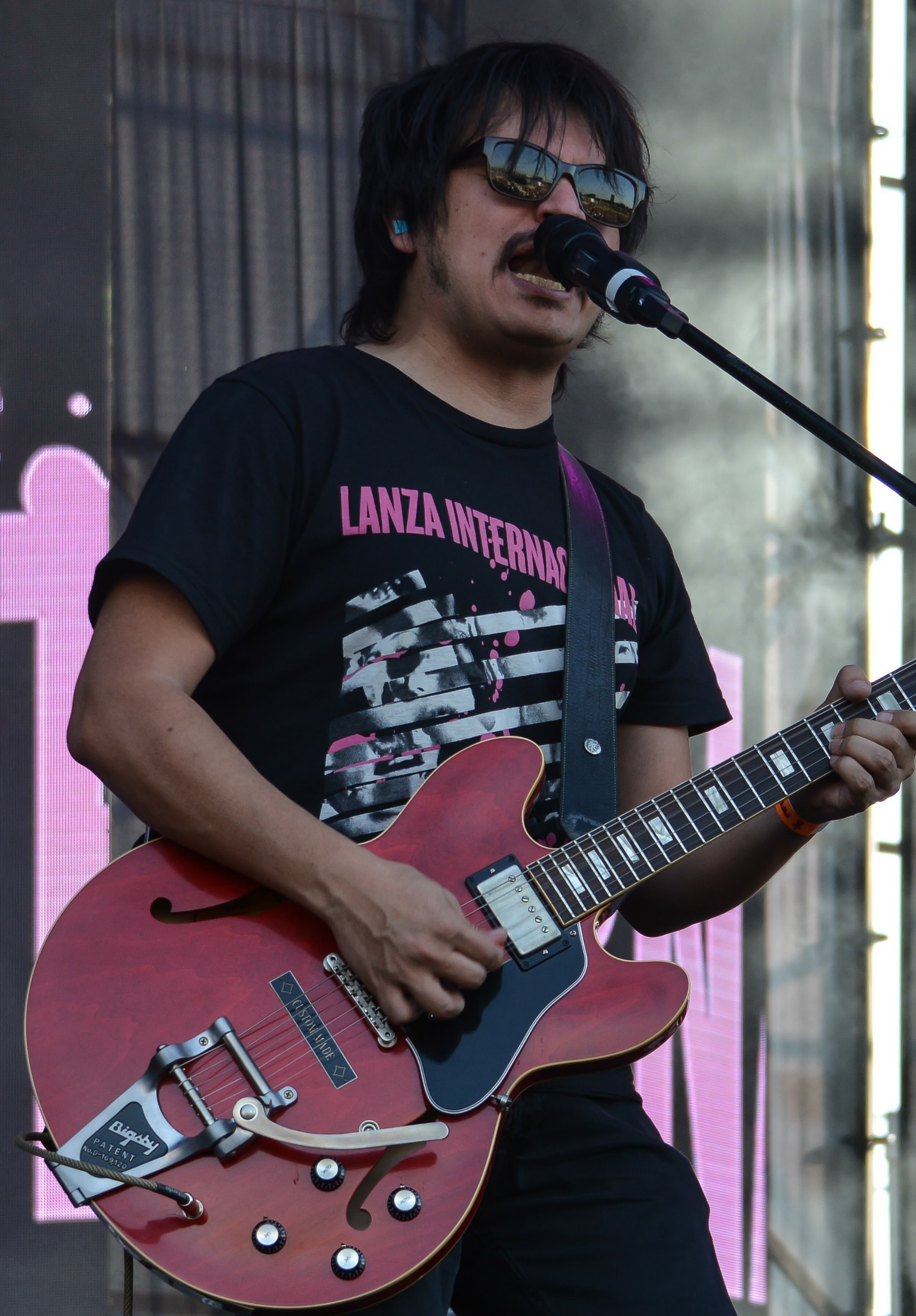 Francisco Durán en la Cumbre del Rock Chileno 2018, Santiago, Chile